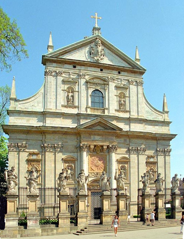 Krakow (Poland) St Peter and Paul Church